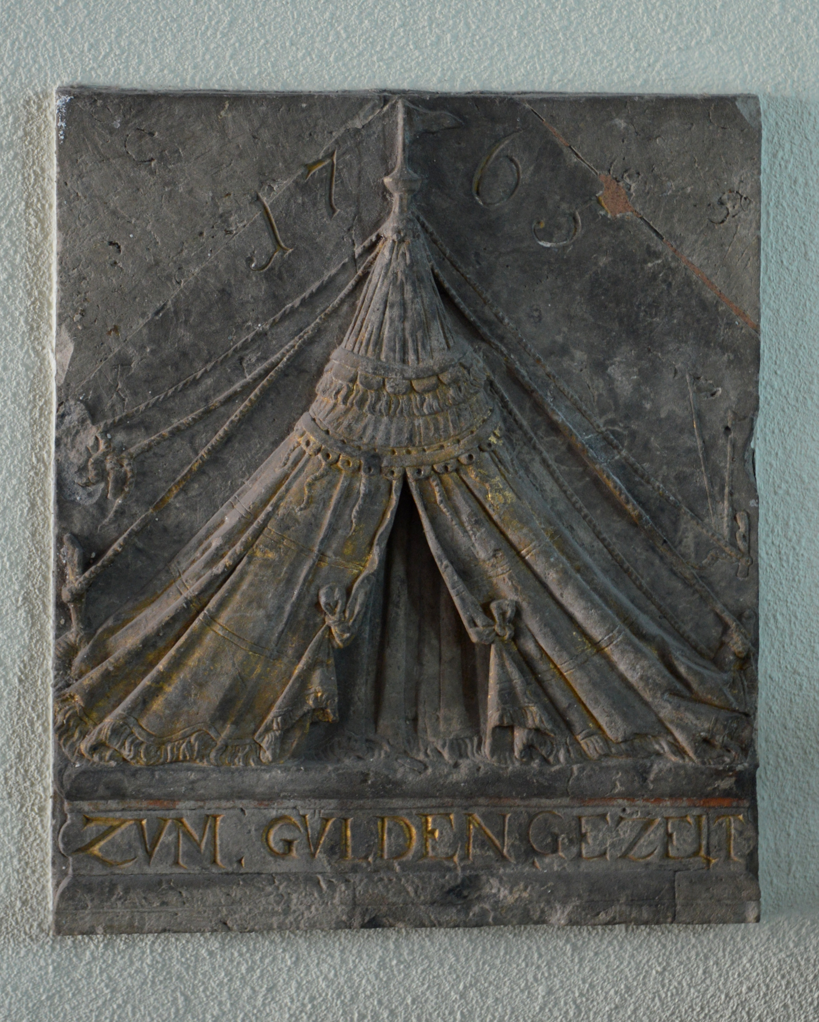 Alter Markt 12, 13 Hauszeichen Magdeburg